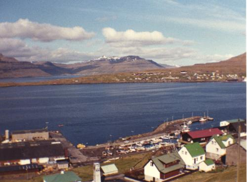 Udsigt over Skálafjørður fra Toftir